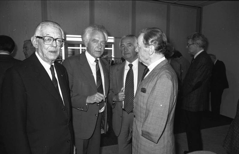 Title: Rhöndorf, Sitzung Stiftung Adenauer-Haus Extra information: Von links: Hans von Herwarth, Hans Booms, Dr. Erich Mende, Dr. Rolf Friedemann Pauls People in the image: Herwarth, Hans von: Botschafter in Großbritannien, Bundesrepublik Deutschland (GND 118550101) Booms, Hans Prof. Dr.: Präsident des Bundesarchivs, Bundesrepublik Deutschland Mende, Erich Dr. jur.: Vizekanzler, MdB, FDP, Minister für Gesamtdeutsche Fragen, Bundesrepublik Deutschland (GND 118580671) Factual corrections and alternative descriptions are encouraged separately from the original description. Additionally errors can be reported at this page to inform the Bundesarchiv. Original historic description: 23.4.1987 Röhndorfer Gespräch der Konrad-Adenauer-Stiftung im Hotel Semaris, Bad Honnef.